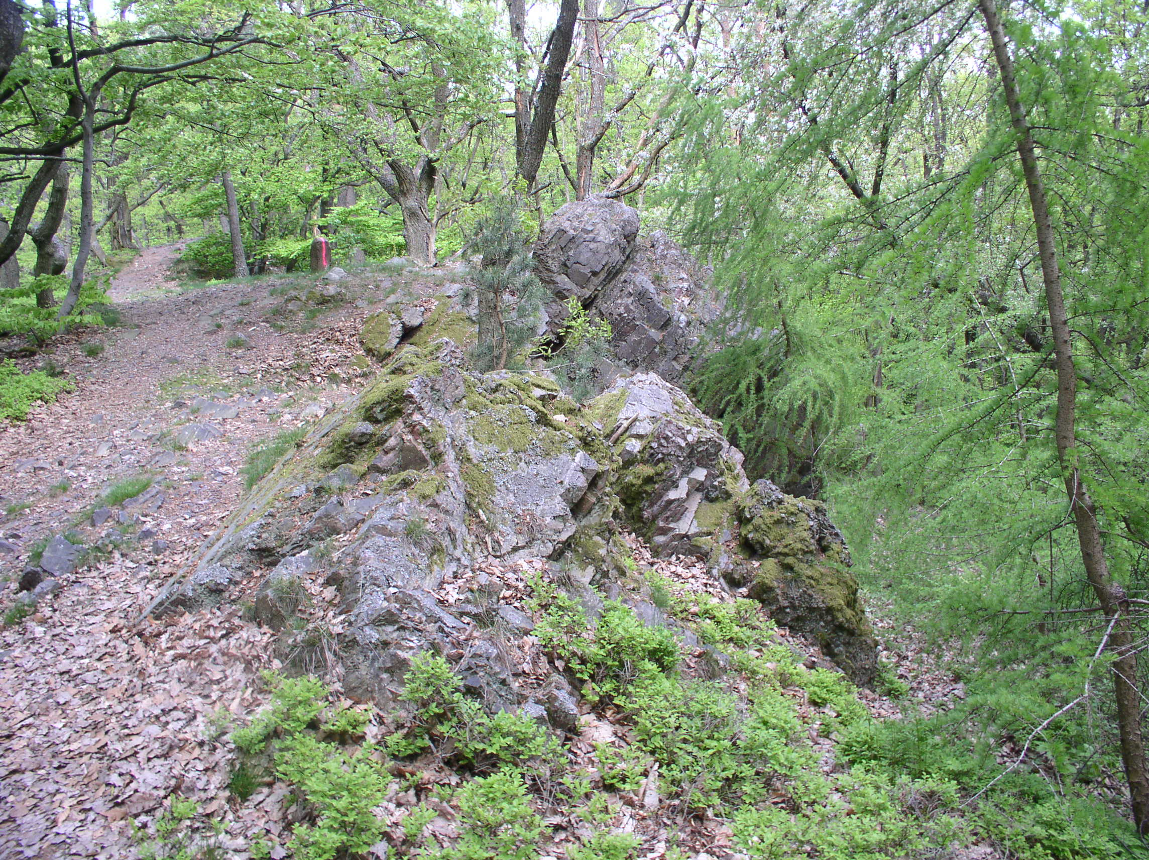 Offenliegender Quarzitschiefer. Erosionsgefährdeter Gipfelweg